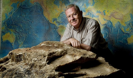 פרופסור למדעי כדור הארץ צבי גרפונקל